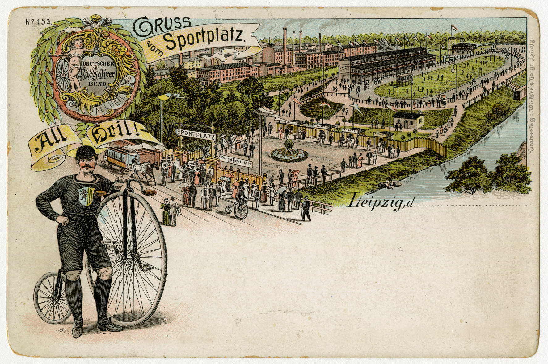 Der Sportplatz um 1895, Postkarte, Inv.-Nr. Stadtgeschichtliches Museum Leipzig: PK 1362.